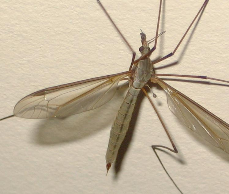 Komarnica (Tipula oleracea)